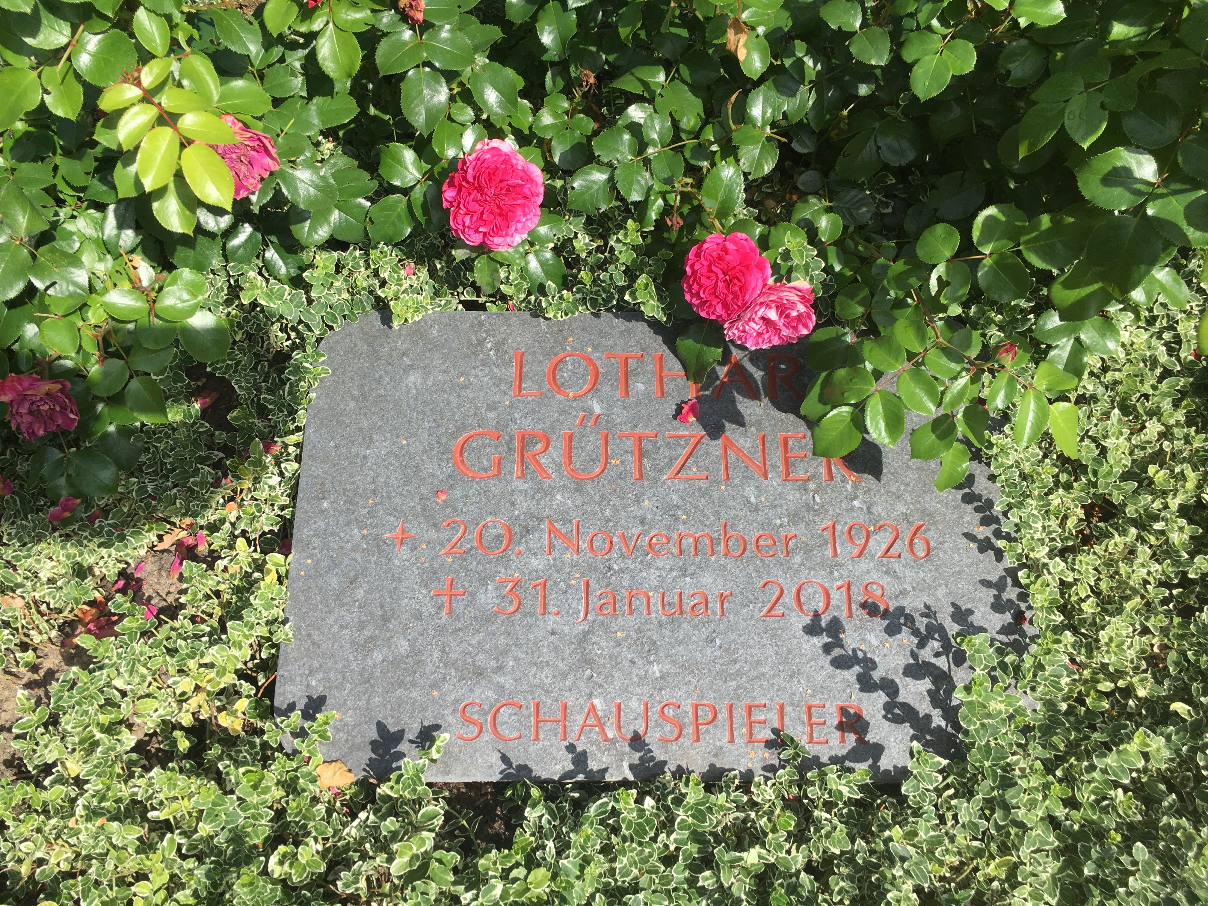 Grabstätte Lothar Grützner 2020